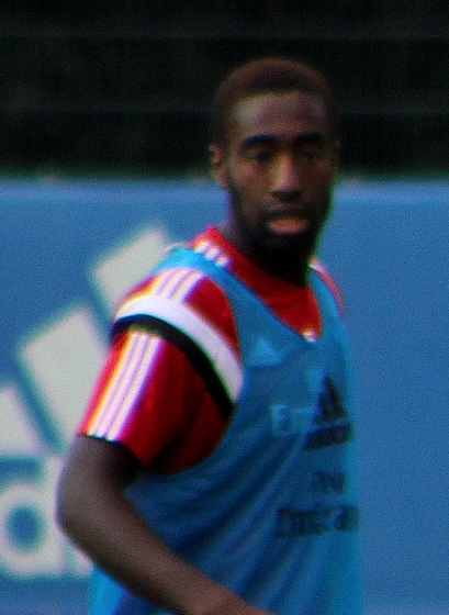 Johan Djourou beim HSV-Training am 14. August 2014.